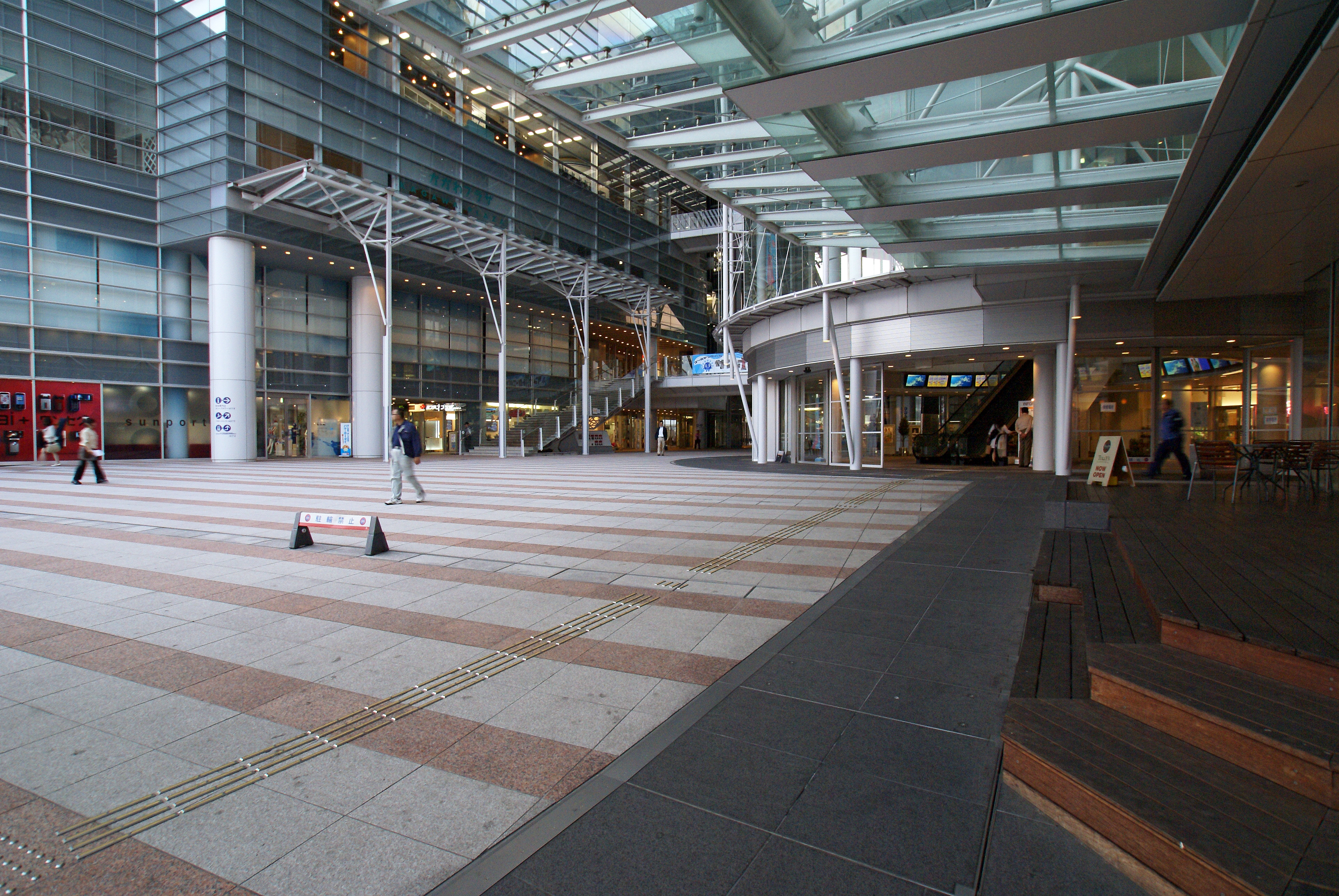 Takamatsu Symbol Tower of Sunport-Takamatsu in Takamatsu, Kagawa, Japan